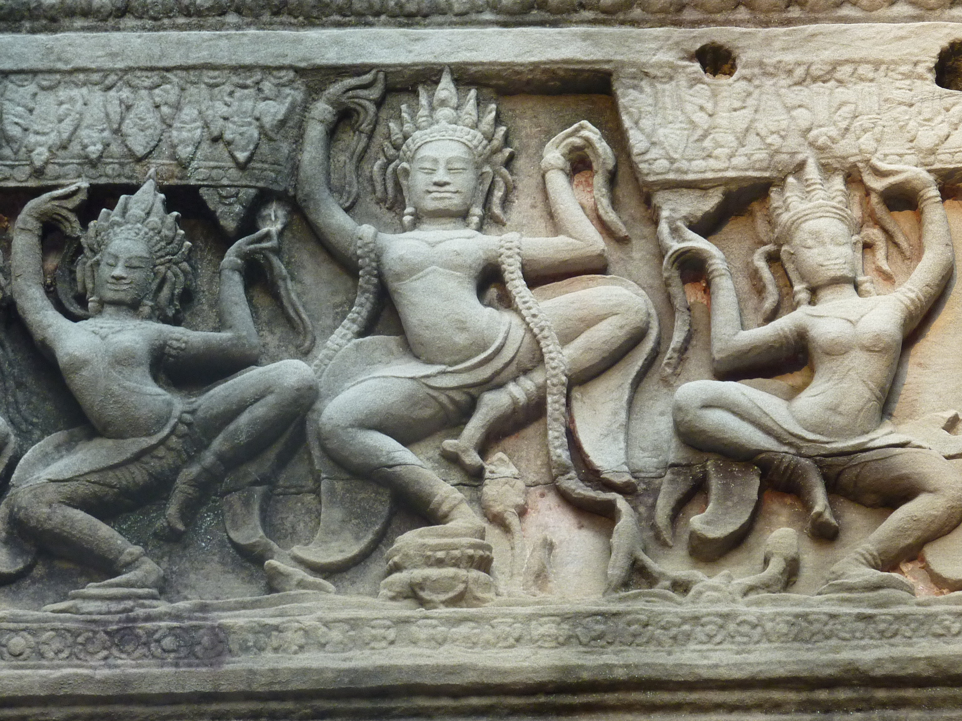 016 Apsaras Dancing at Preah Khan Photograph from Preah Khan at Angkor, Cambodia taken by Anandajoti.